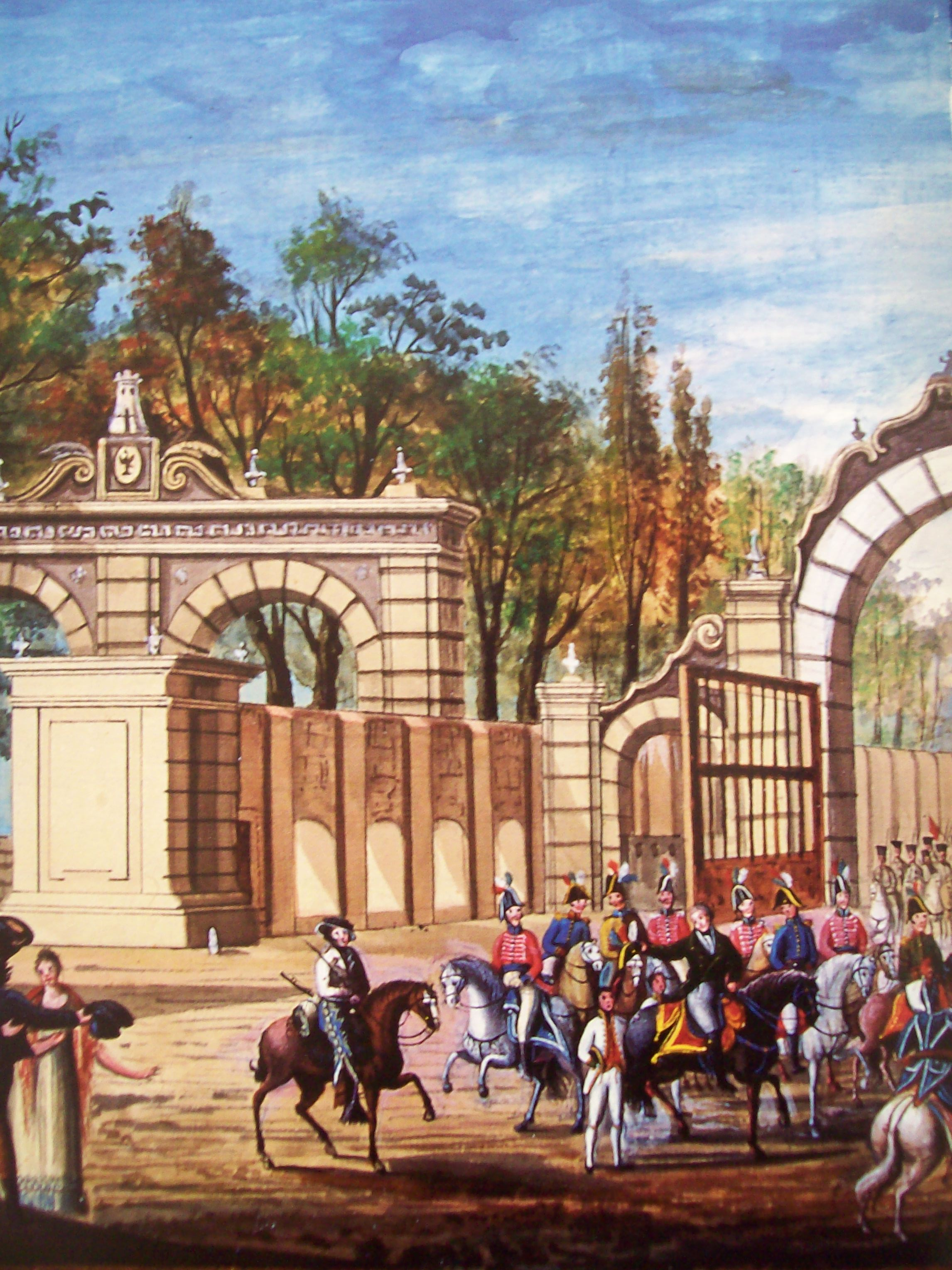 Entrada triunfante de Iturbide en México con el Ejército Trigarante el 27 de septiembre de 1821. Aguafuerte Museo Nacional de Historia, INAH México